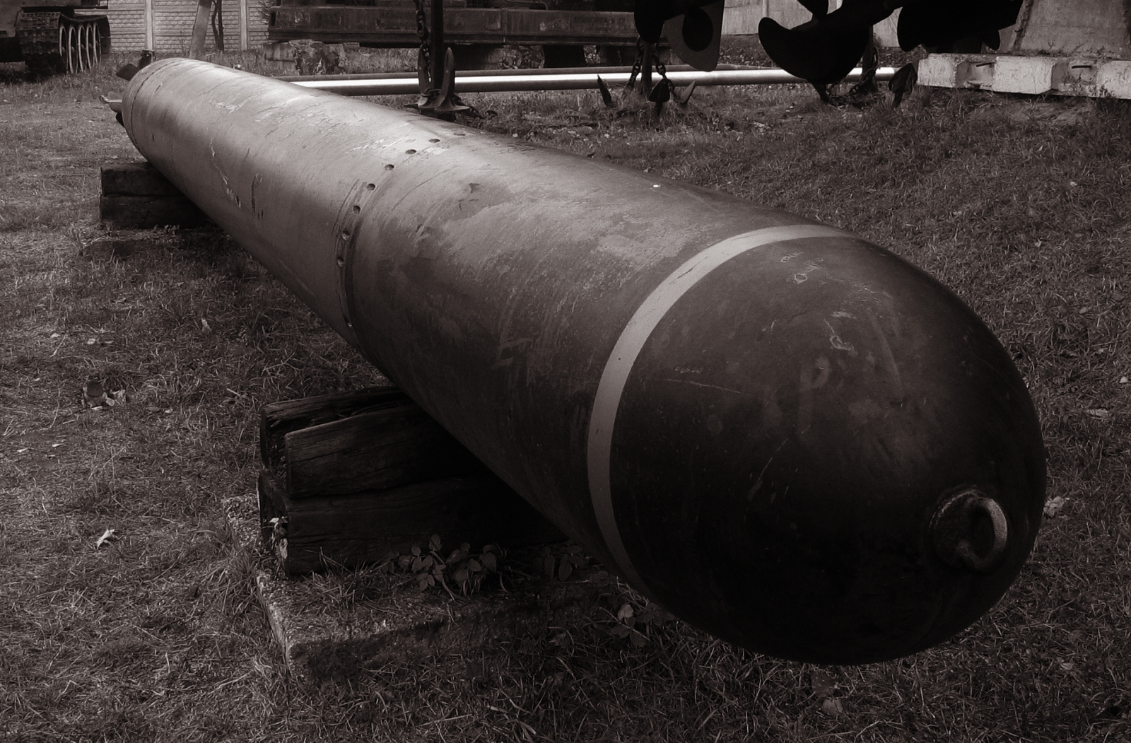 Torpeda